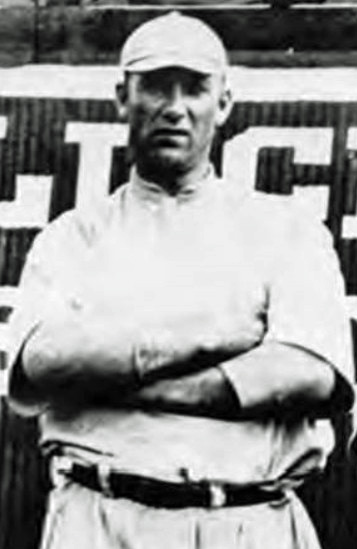 Ed Walker